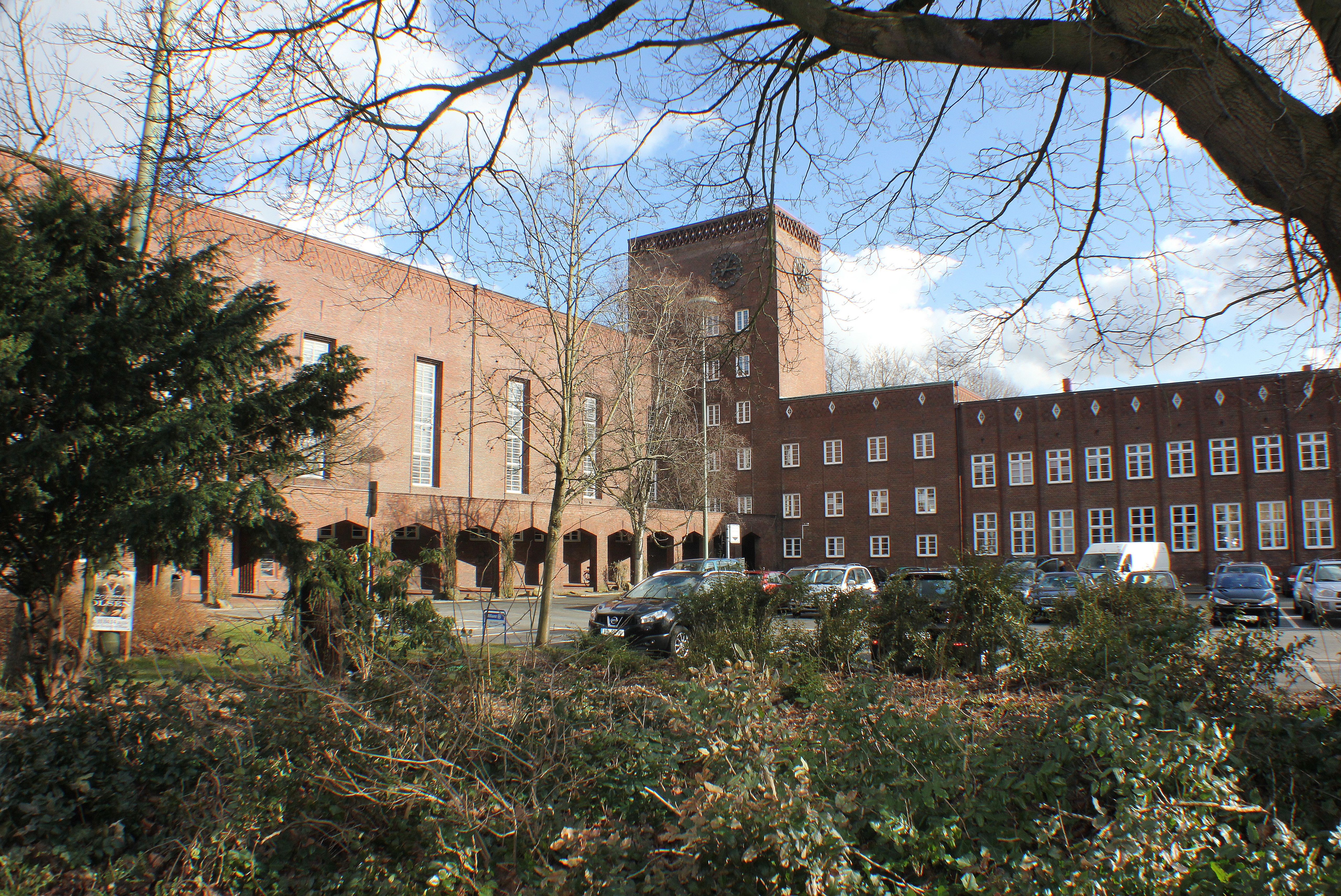 Deutsches Haus, mit Blick über den Berliner Platz (Flensburg 2014)